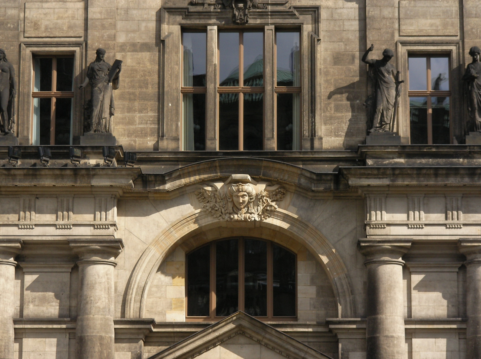 Schlossplatz (Dresden), Oberlandesgericht_Dresden